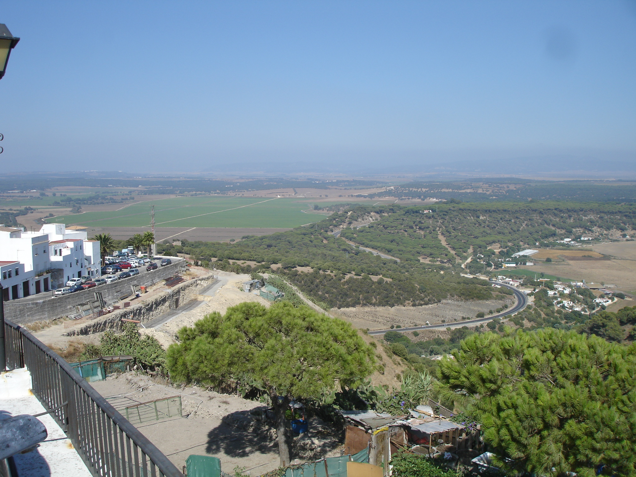 La Janda from Vejer (SPAIN)